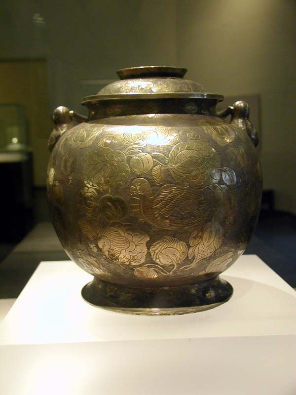 鎏金鹦鹉纹提梁银罐，本文物1970年发现于陕西西安何家村唐代窖藏，原藏于陕西历史博物馆，藏品号七一277，高24.1厘米，口径12厘米，壁厚0.21厘米，重1879克。饰有流行于唐代的折枝花草纹和鹦鹉纹。2004年7月展出于北京大学赛克勒考古与艺术博物馆，Mountain于2004年7月28日拍摄。拍摄者已授权依照GFDL协议发布该图像。